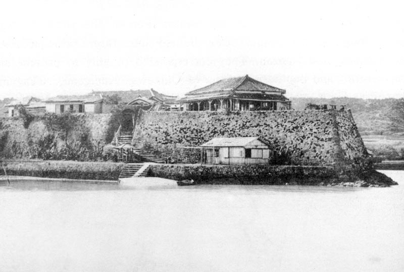 琉球国金库 zh:1879年由美国总统格兰特访日随行团成员拍摄 在美国版权已过期的图像